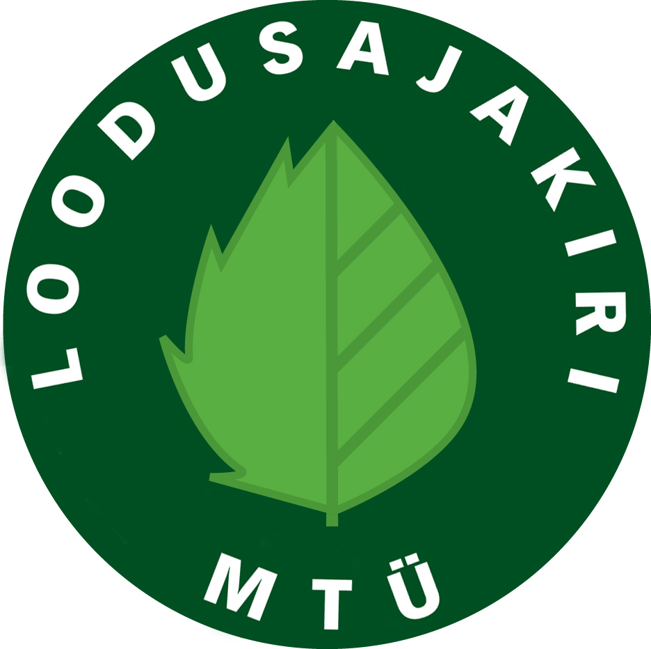 MTÜ Loodusajakiri logo